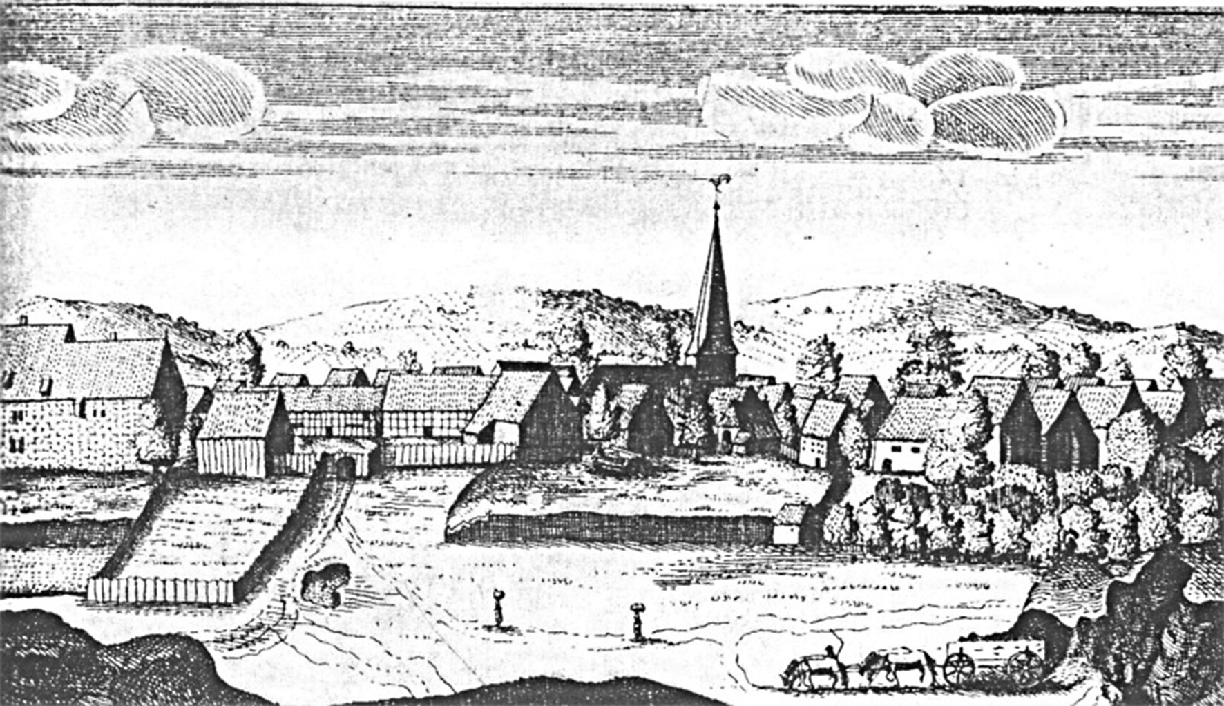 Alverdissen, Kupferstich von Elias van Lennep um 1663